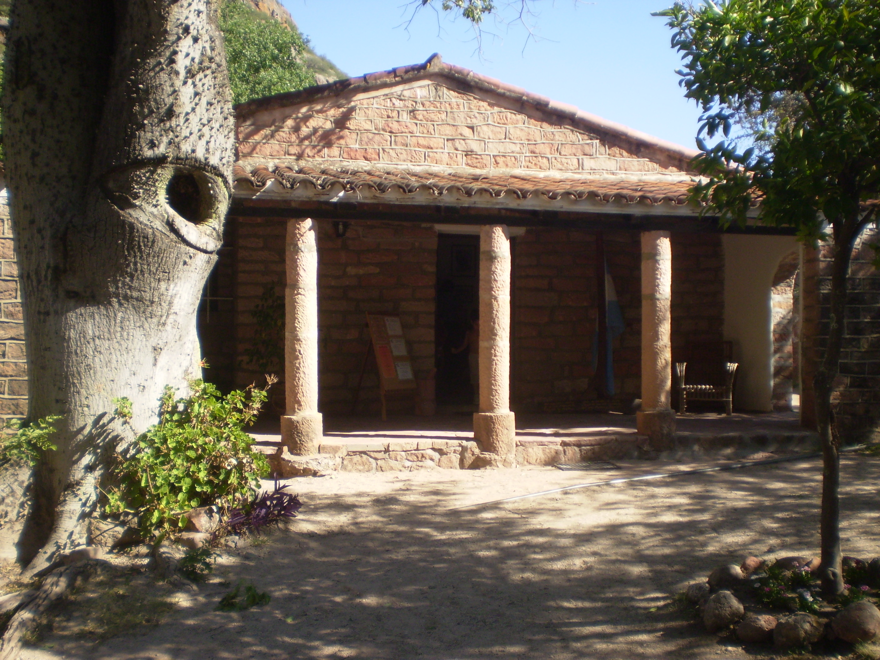 Detalle de la fachada de la casa museo Atahualpa Yupanqui en Cerro Colorado, Córdoba, Argentina